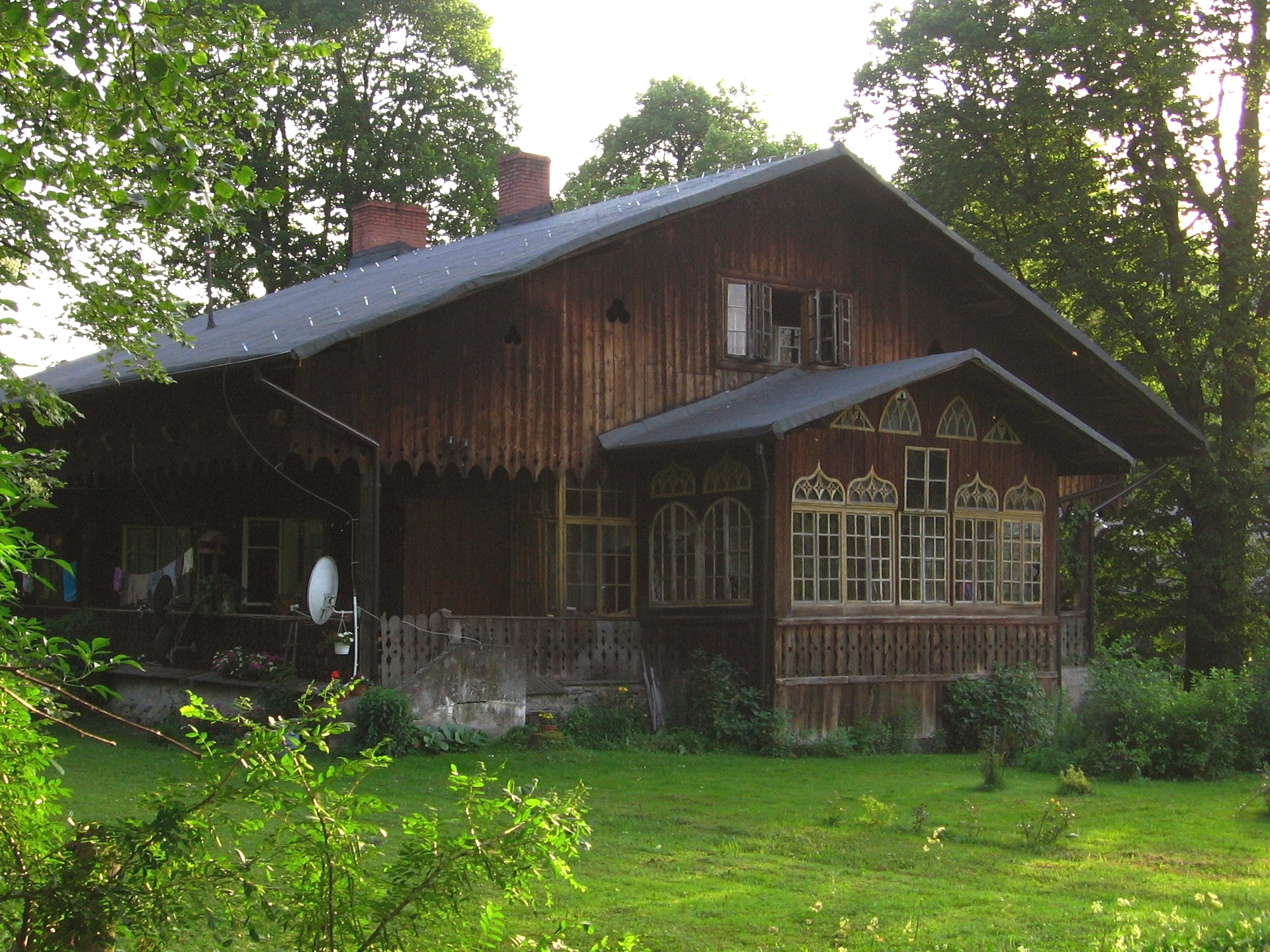 Zabytkowa leśniczówka z 1853 roku w Złatnej (nr rej.: A-544/87 z 22.12.1987).